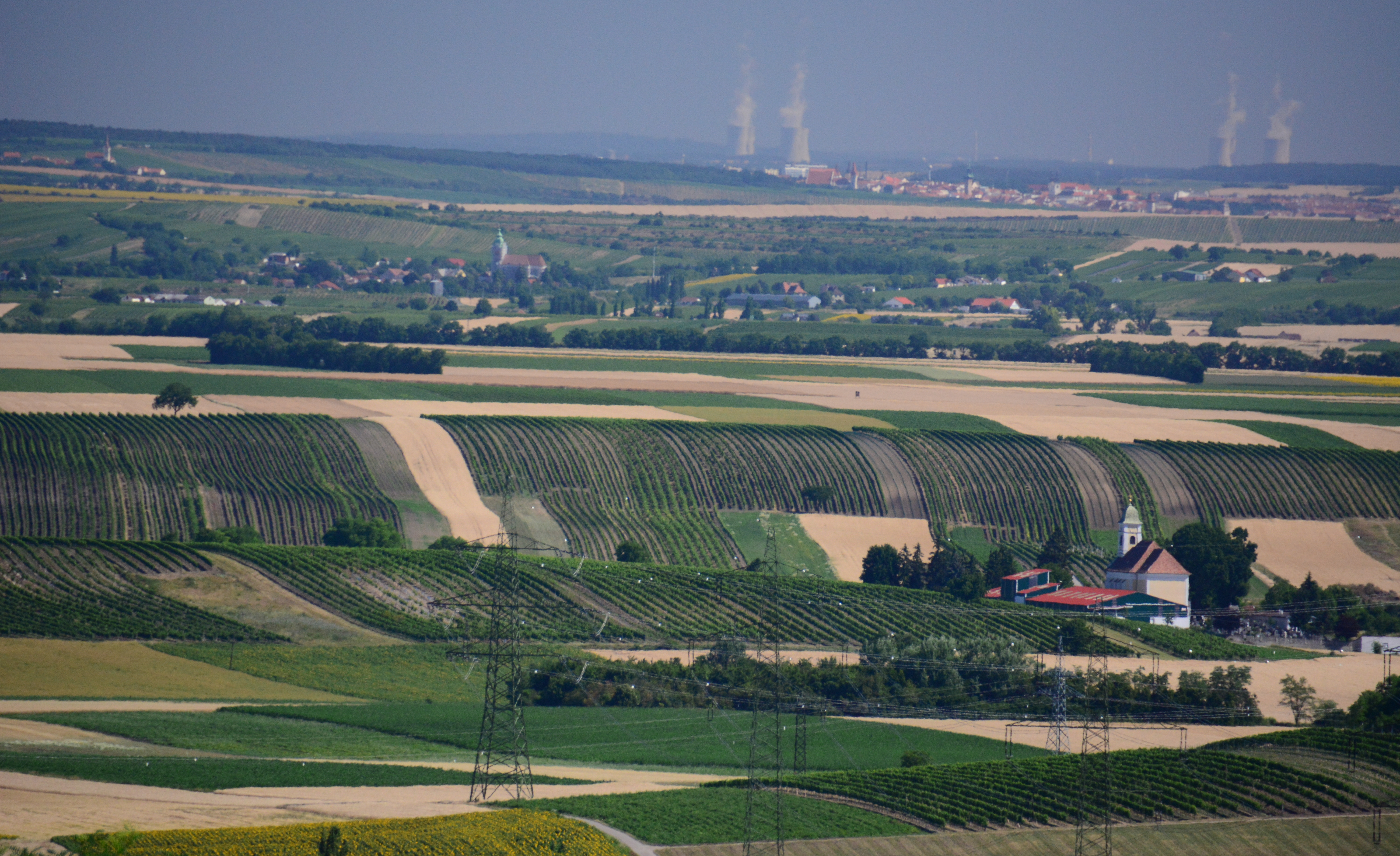 Das AKW Dukovany bei Brno/Brünn, fotografiert von einem Aussichtsturm bei Platt (Gemeinde Zellerndorf) in Niederösterreich